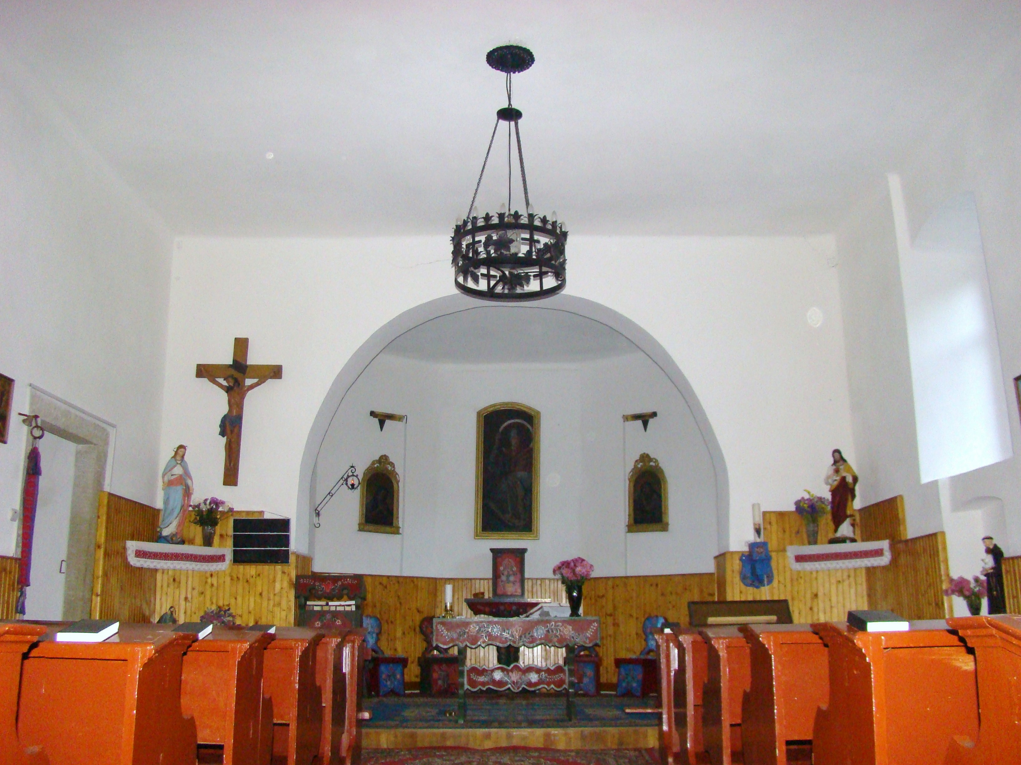 Biserica romano -catolică, sat Gheorghieni; comuna Feleacu, județul Cluj